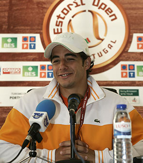 Frederico Gil press conference